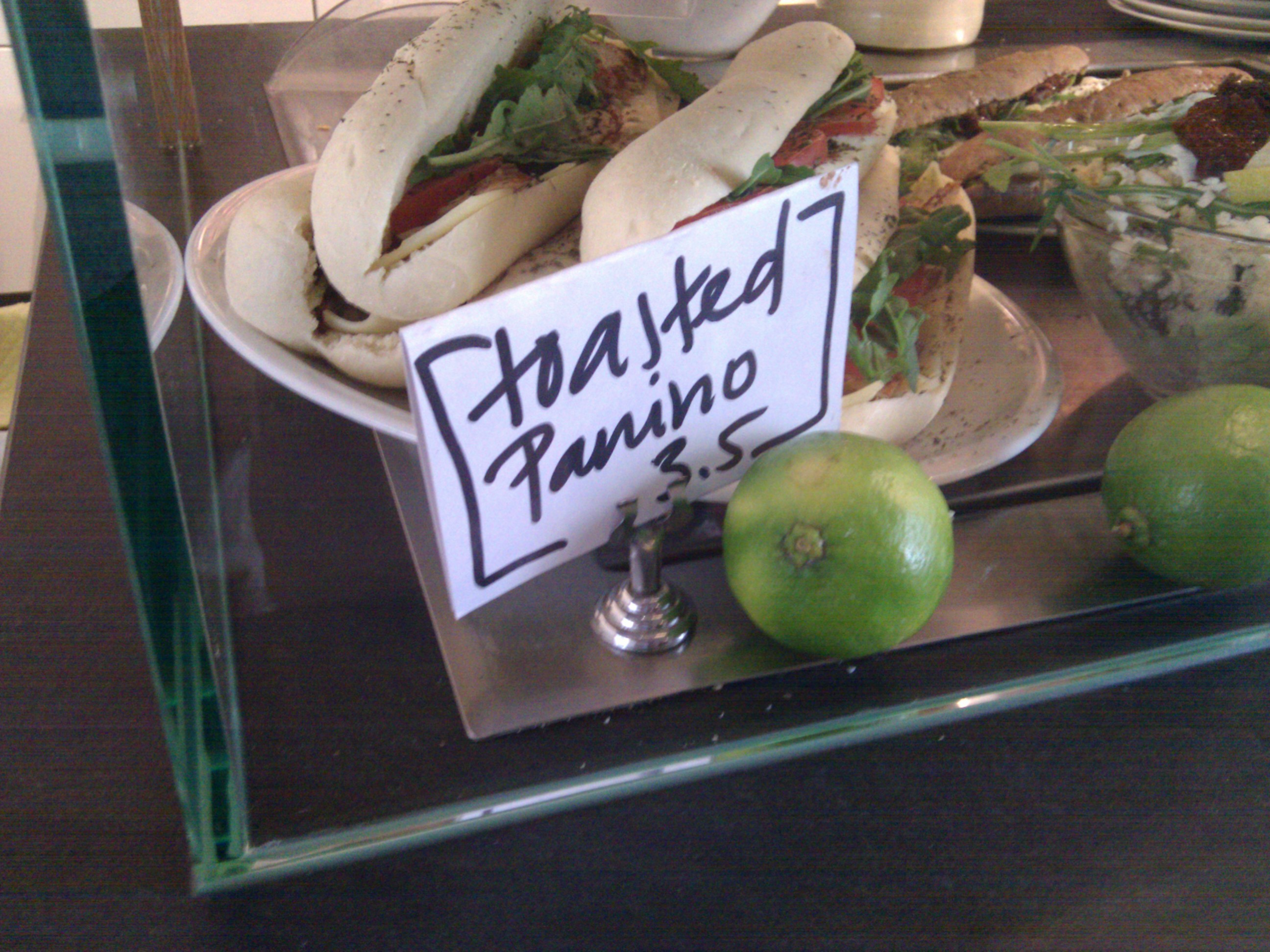 Angebot an Panini (Plural von Panino)